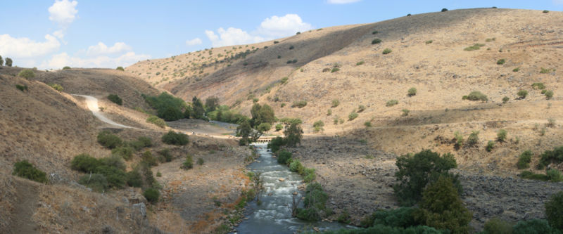 נהר הירדן, בקעת הירדן